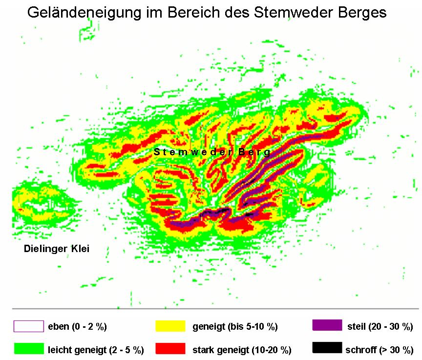 Karte, die die Geländeneigung des Stemweder Berges beschreibt